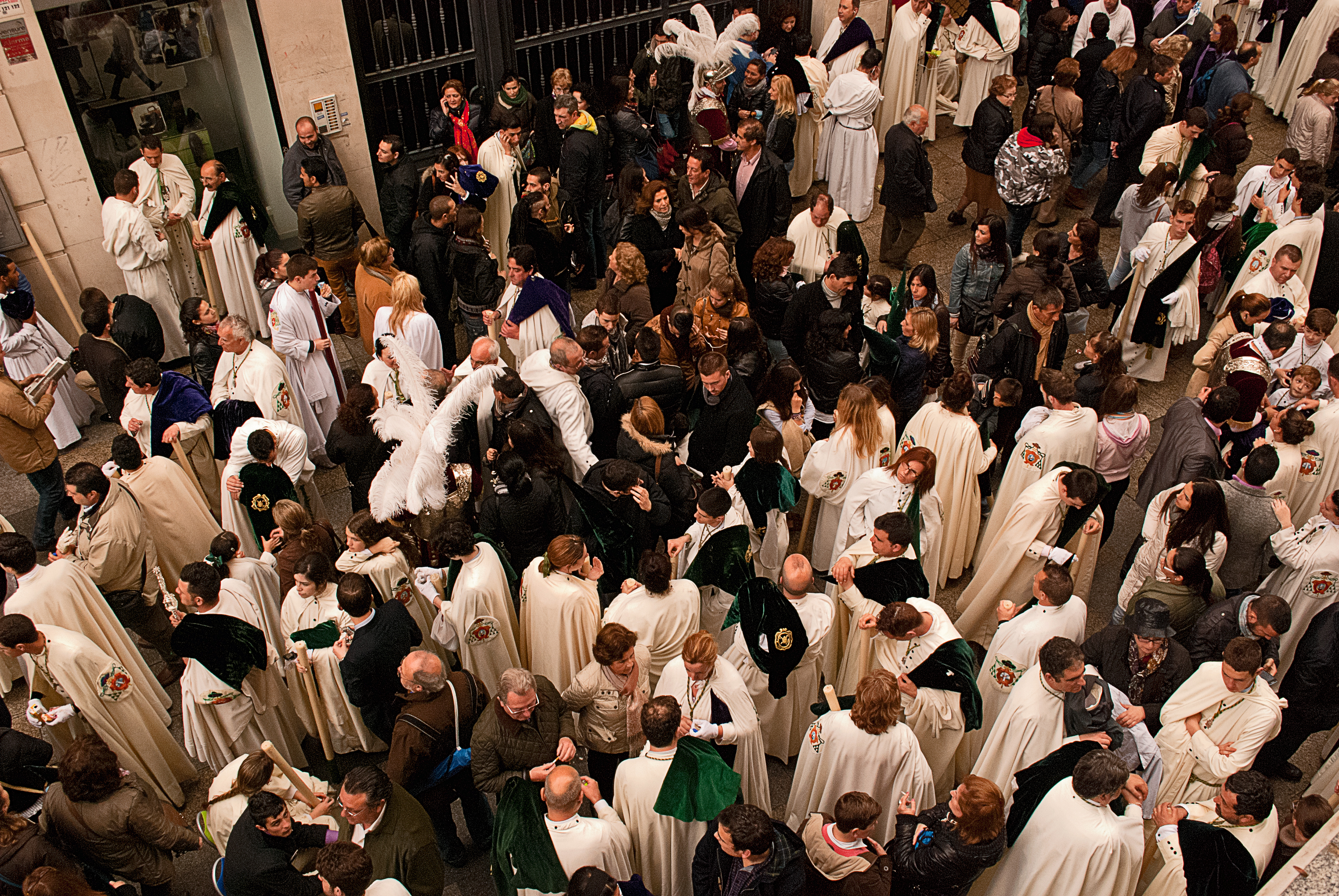 Nazarenos de la hermandad de la Macarena desperdigados, tras la aparición de la lluvia